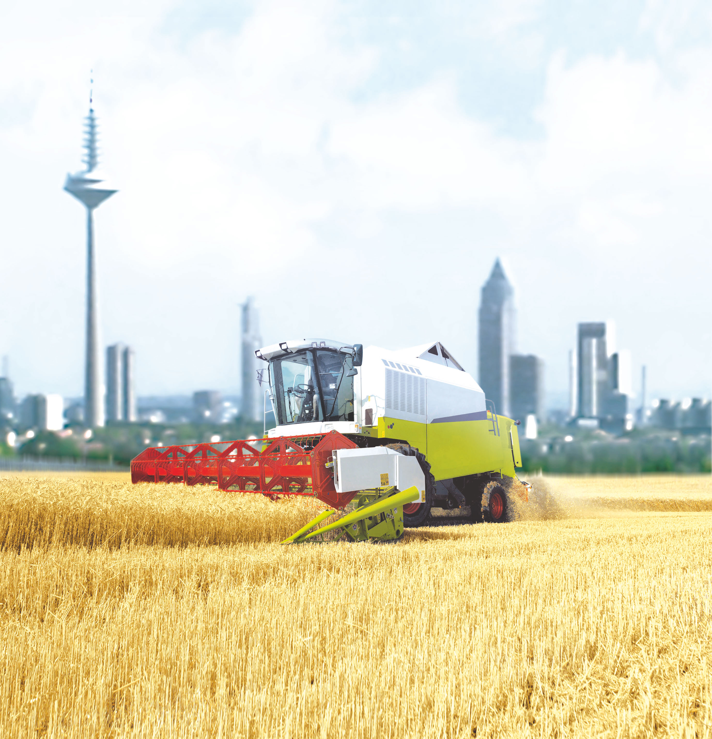 Landwirtschaft in Frankfurt. Im Spannungsfeld einer stadtnahen Landwirtschaft treten die besonders schwierigen Produktionsbedingungen in den Vordergrund. – Abgebildet ist ein Claas-Mähdrescher; das Bild scheint bearbeitet zu sein (u.a. Fahrzeugkennzeichnungen entfernt).